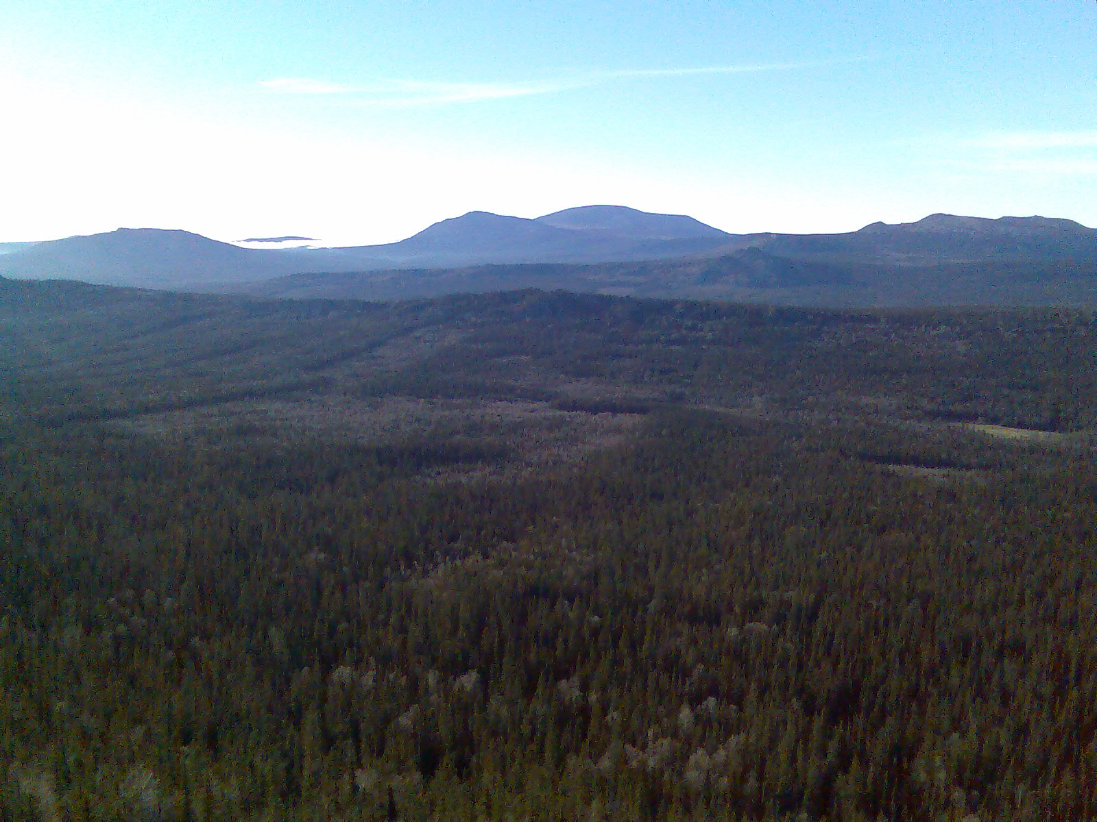 Вид на Ямантау